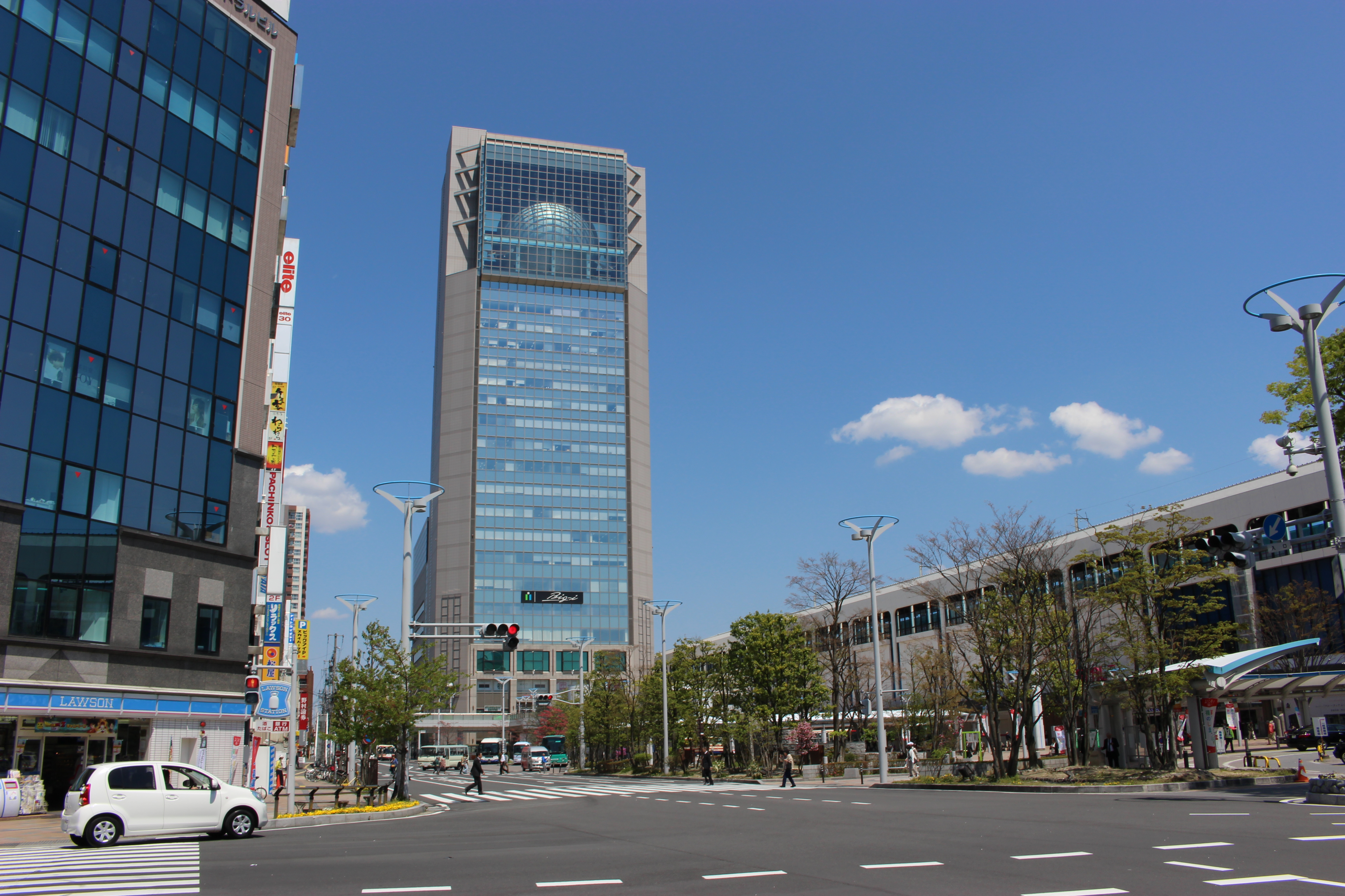 郡山ビッグアイ（2015年4月撮影）